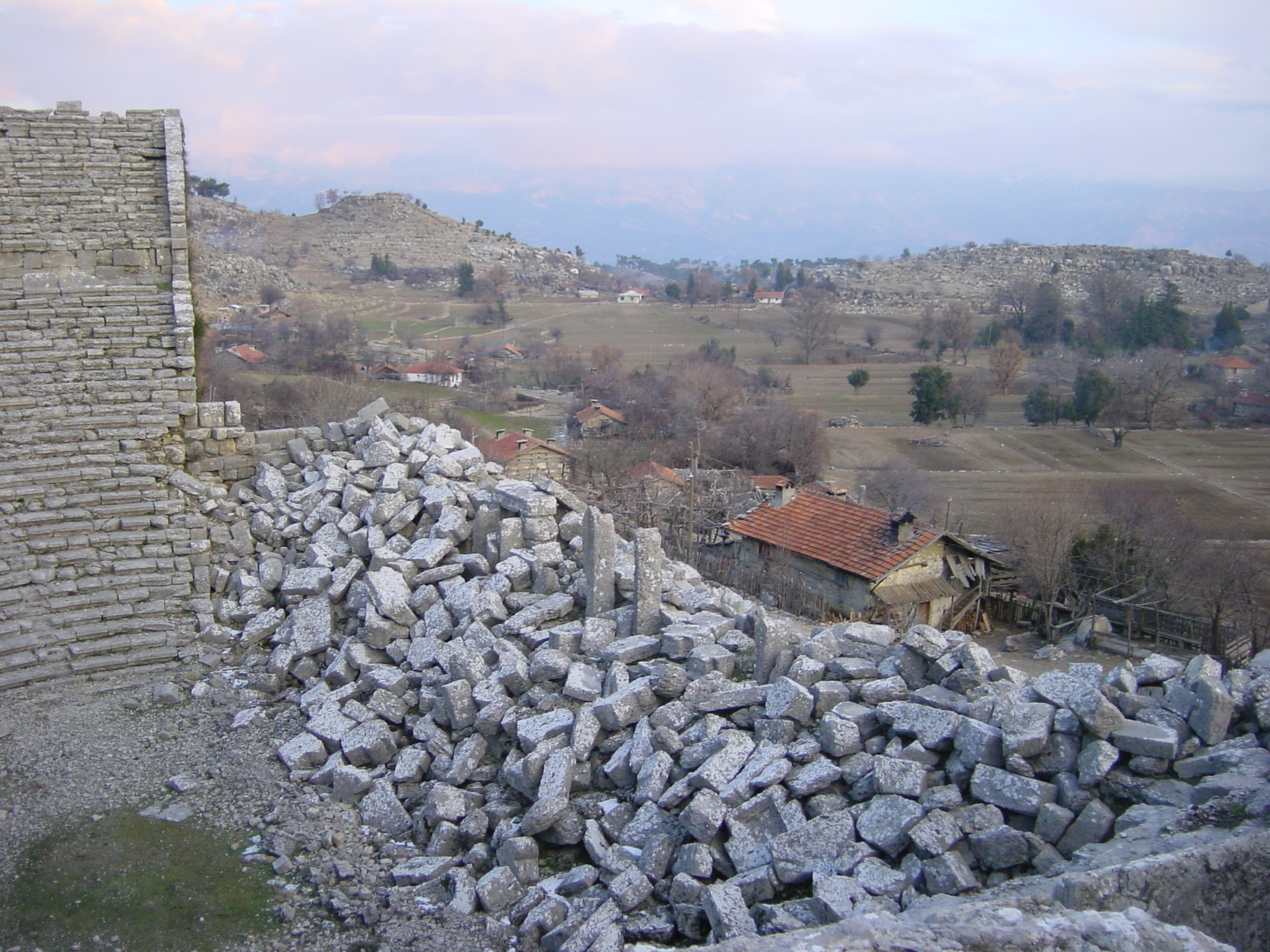 2003-12-28 01-04 Türkei 100 Selge